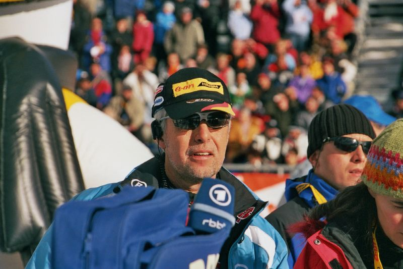 Uwe Müssiggang als Trainer während des Weltcupwochenendes 2006 in Antholz